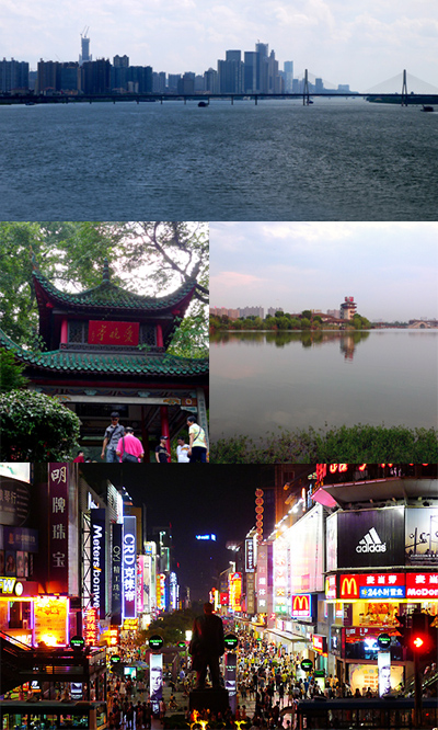 长沙市风光，由上至下顺时针分别为： 湘江城市天际线、月湖公园、黄兴南路商业步行街、爱晚亭